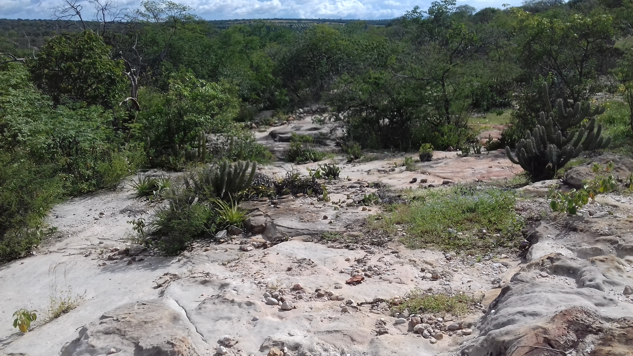 foto da caatinga brasileira